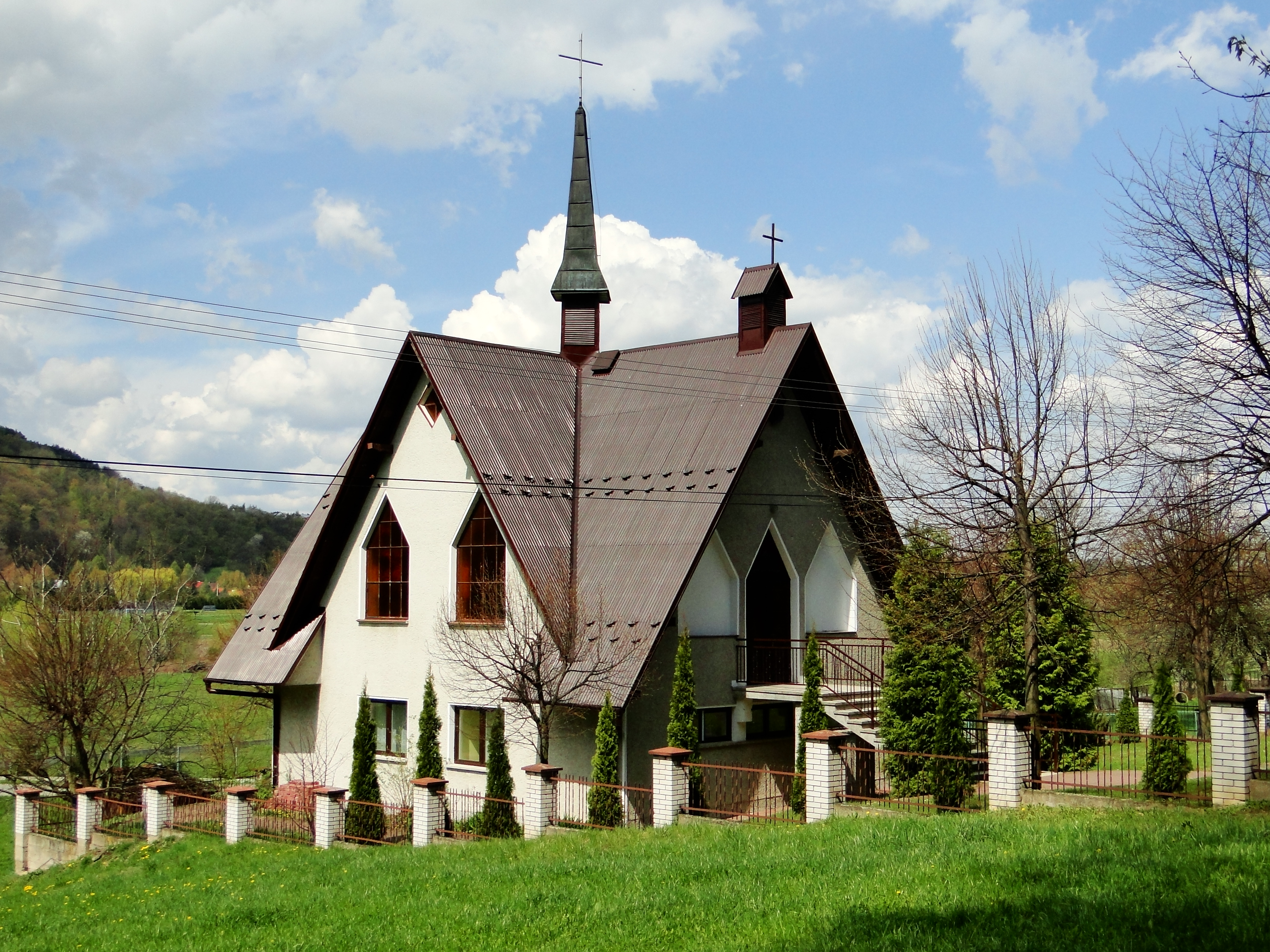 Piaski-Drużków - kaplica rzymskokatolicka p.w. Najświętszego Serca Pana Jezusa, 1992